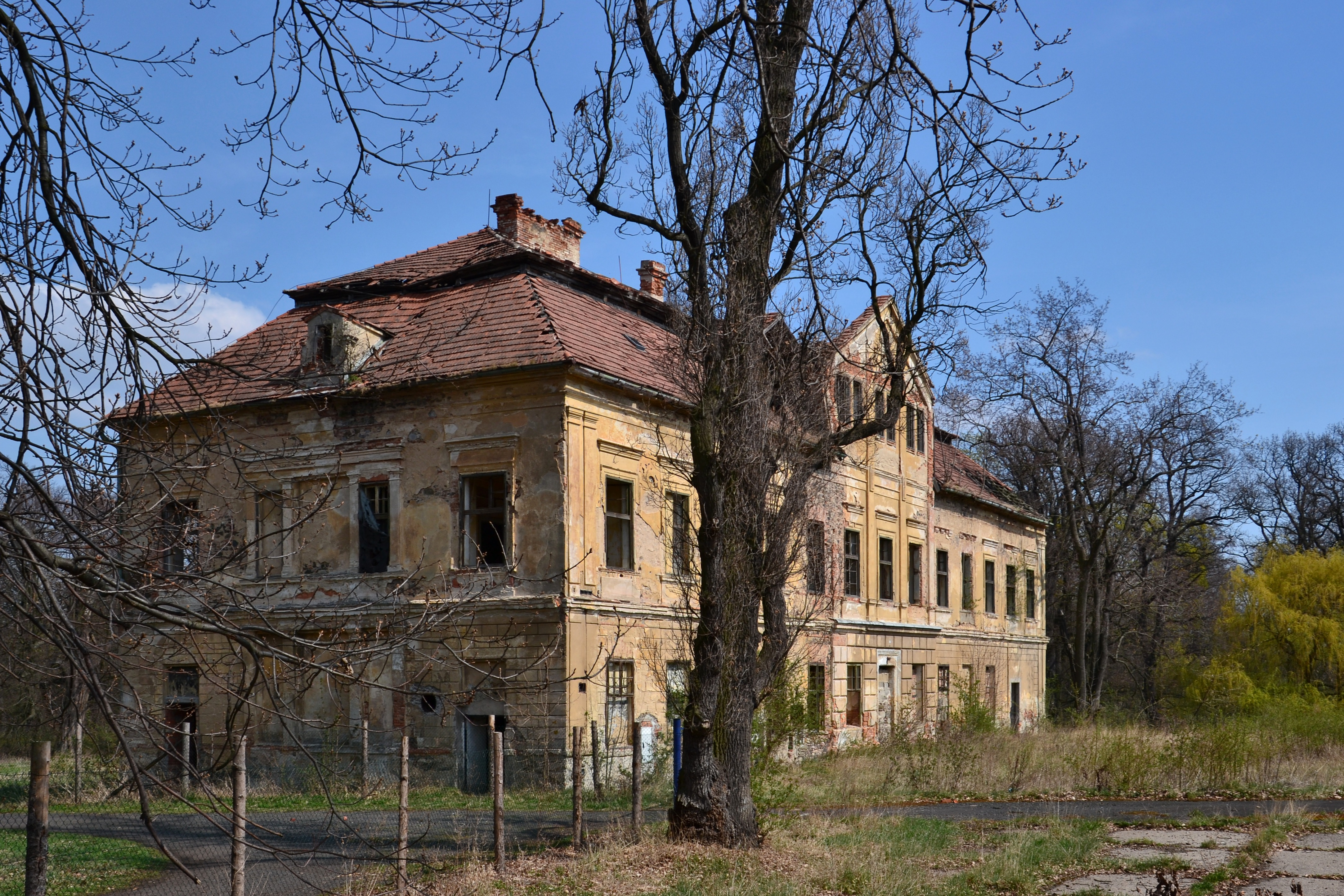 Zámek Vintířov, Vintířov 1